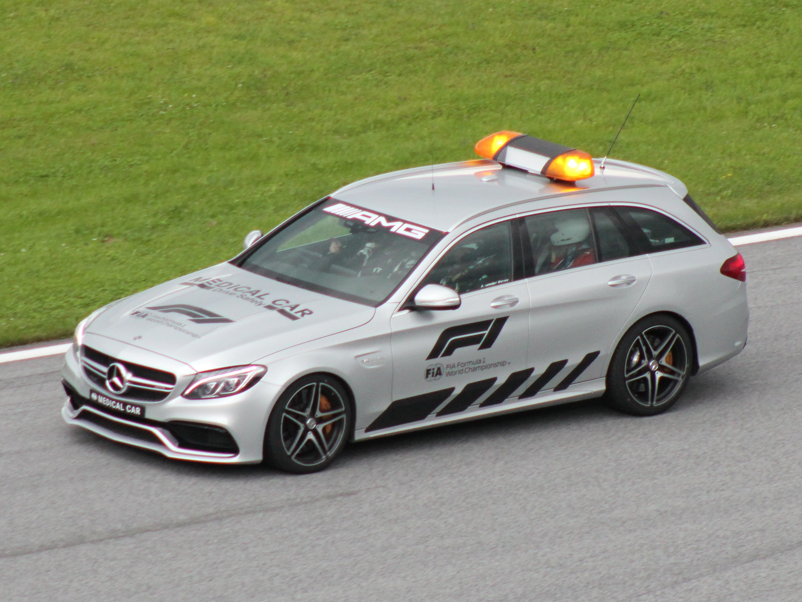 Das 2018er Formel 1 Medical Car beim Großen Preis in Spielberg